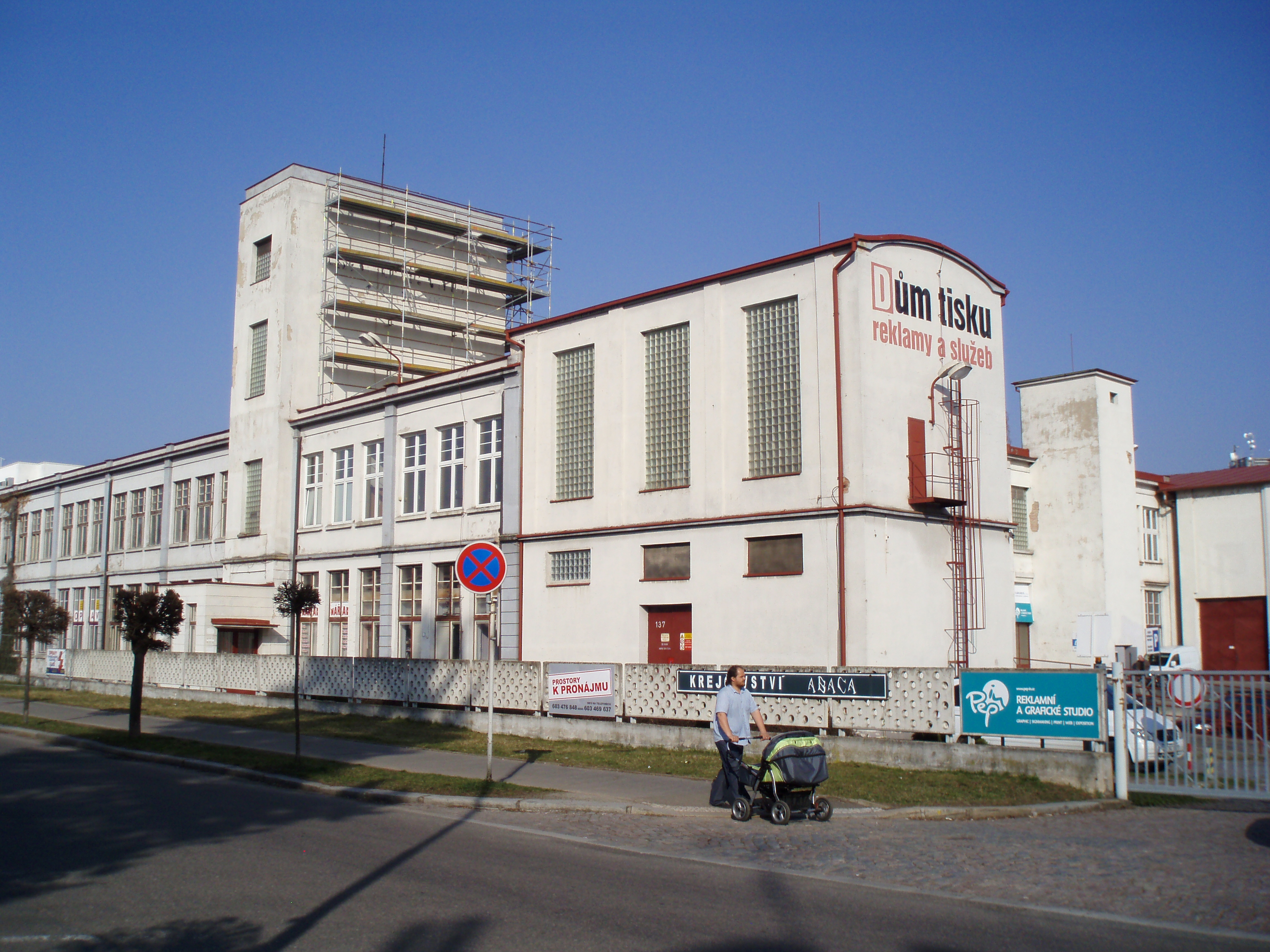 Bývalá Anningerova přádelna